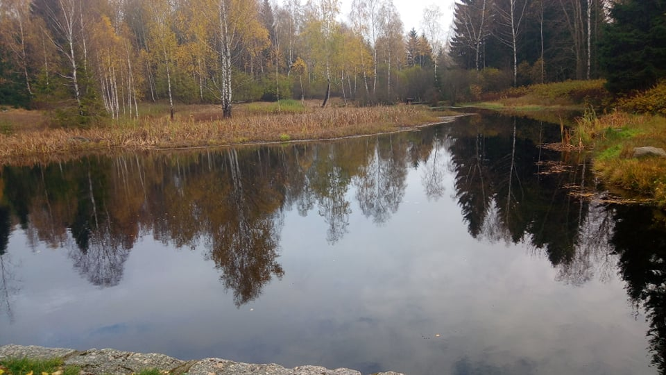 Pohled na čistou hladinu Maxovského rybníka po jeho odbahnění.